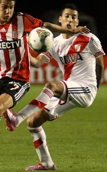 Los futbolistas Carlos Auzqui y Leonel Vangioni, de Estudiantes de La Plata y River Plate, durante el partido de ida de los cuartos de final de la Copa Sudamericana 2014.